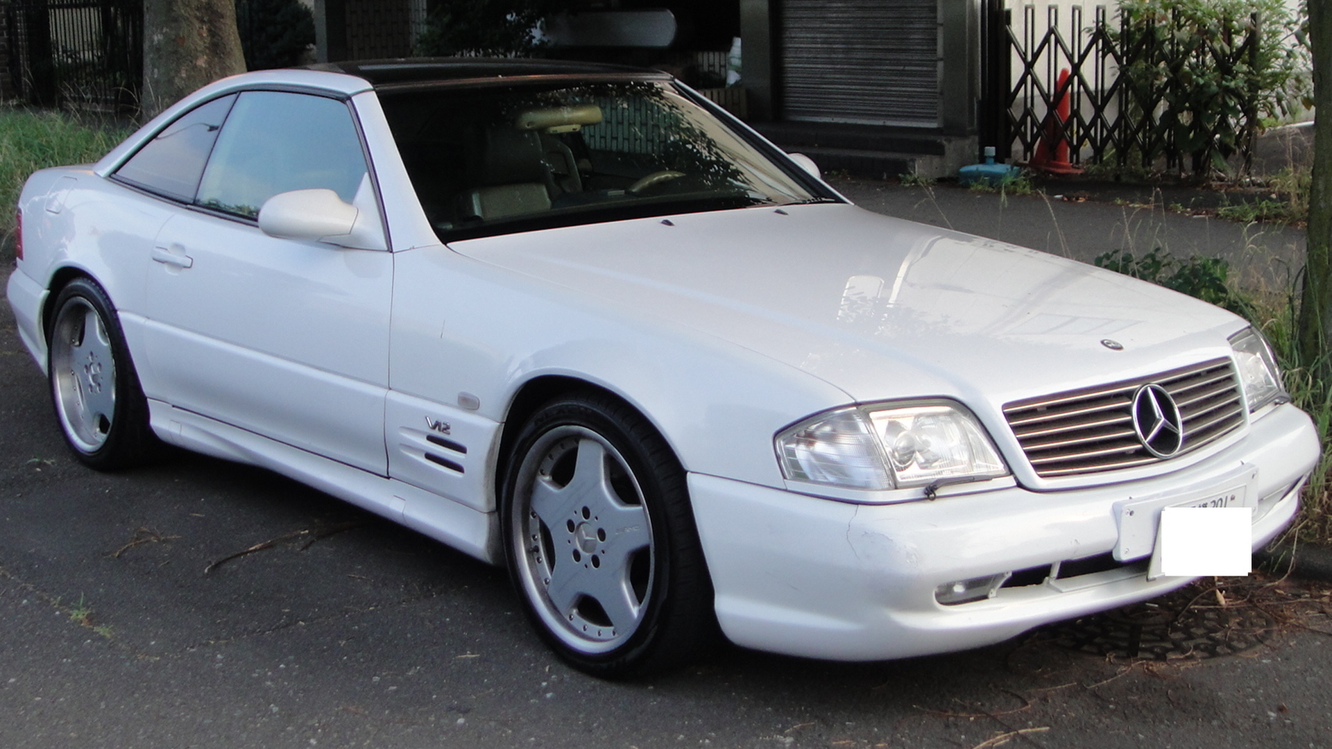 メルセデスベンツSL73 AMG